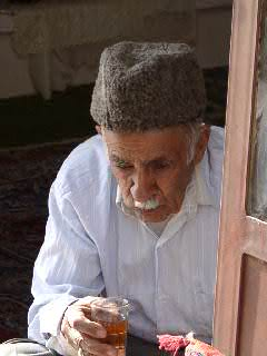 Babu Nasehi, Inhabitant of Kilan